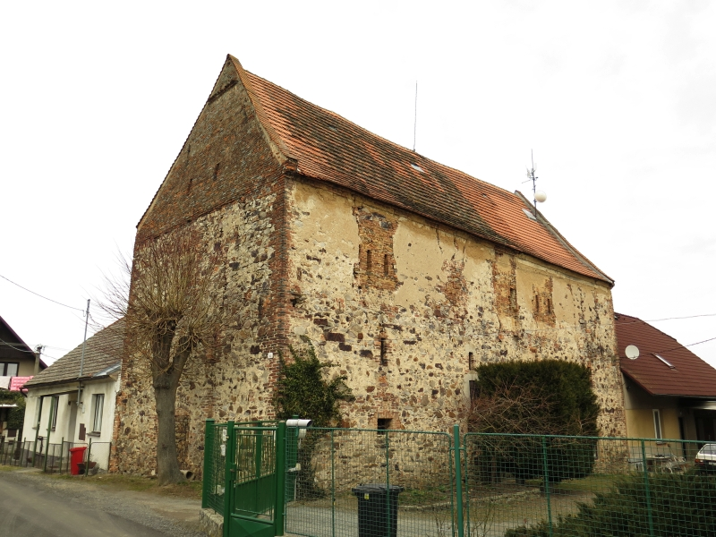 Špýchar dvora čp. 4, Mokrouše 4, Mokrouše.